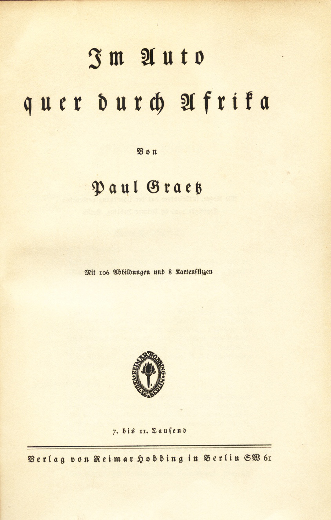 Portada. Paul Graetz. "Im Auto quer durch Afrika". Berlin 1925